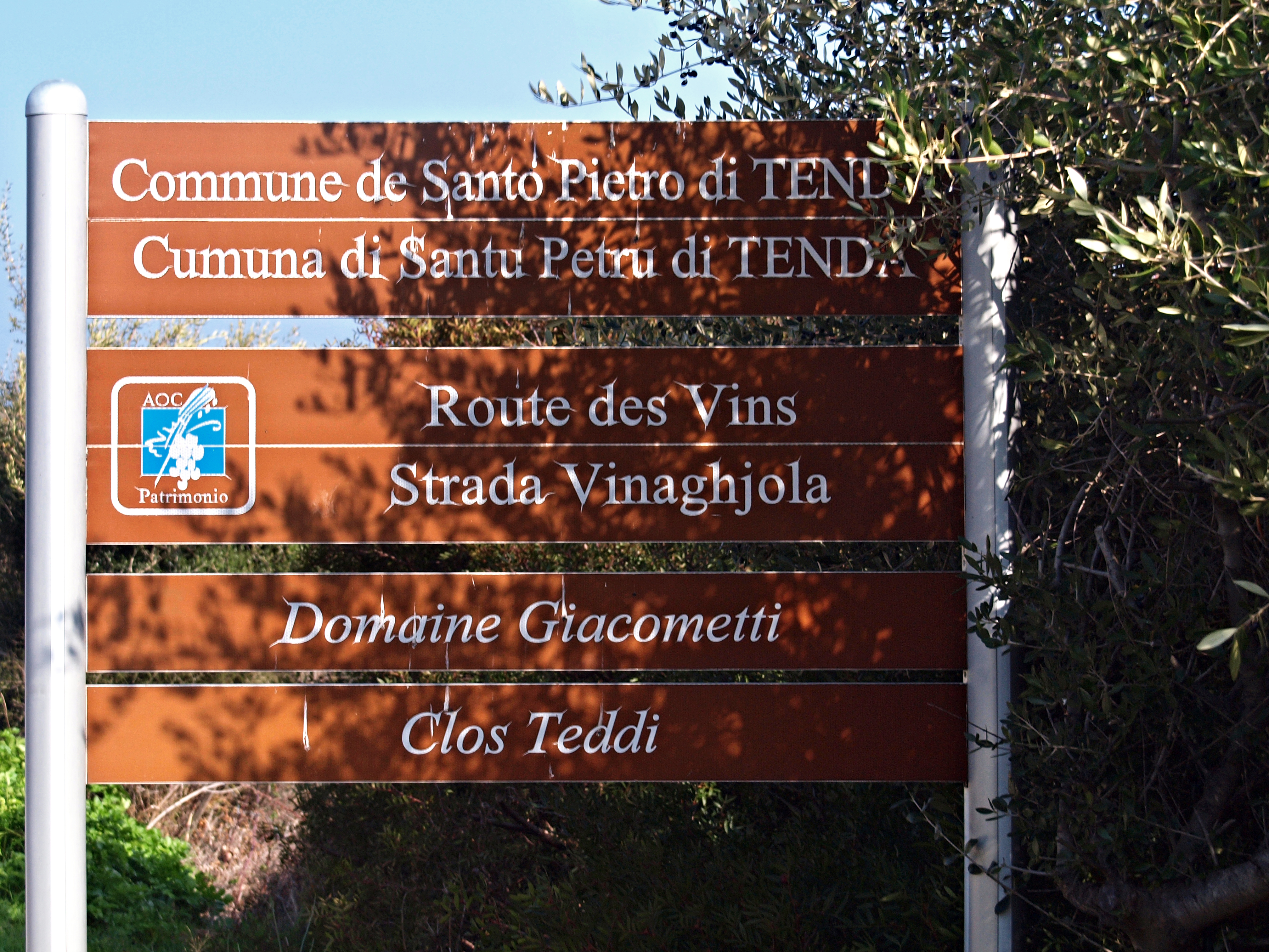 Santo-Pietro-di-Tenda (Corse) - Route des Vins à Casta (domaines du Désert des Agriates)